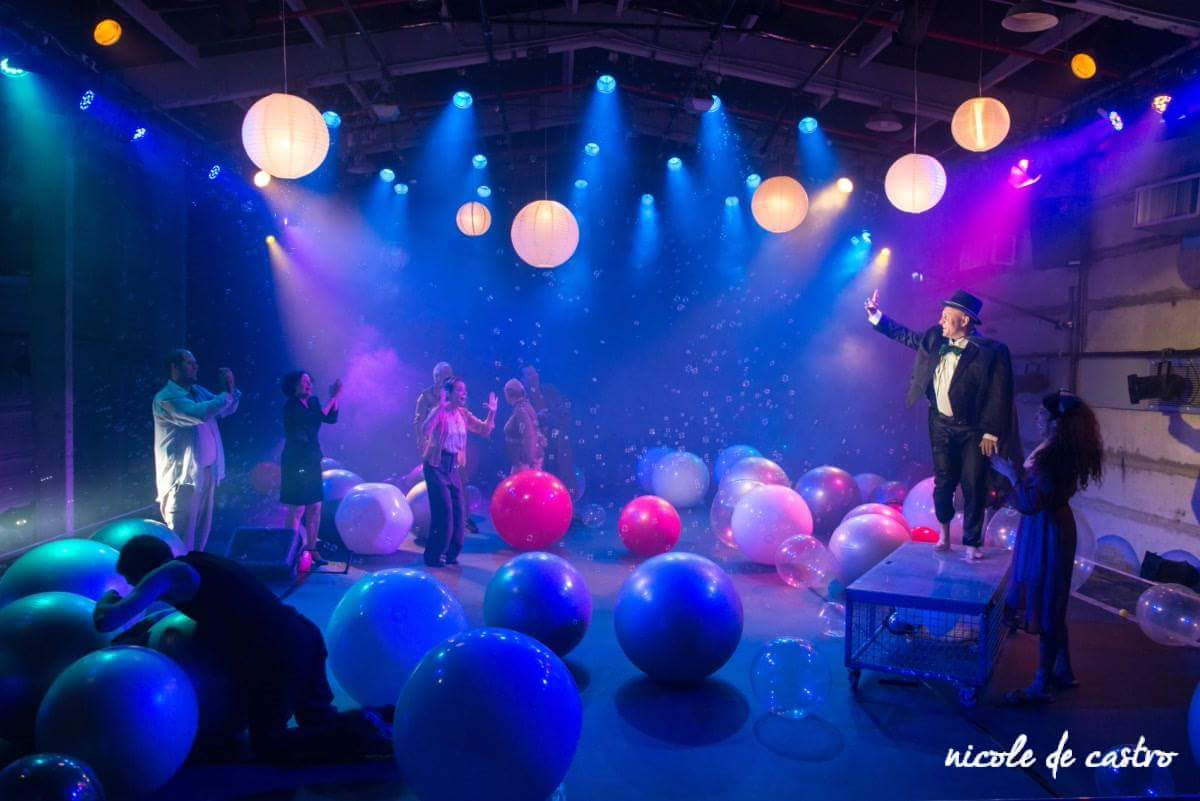 ההצגה הנידפים